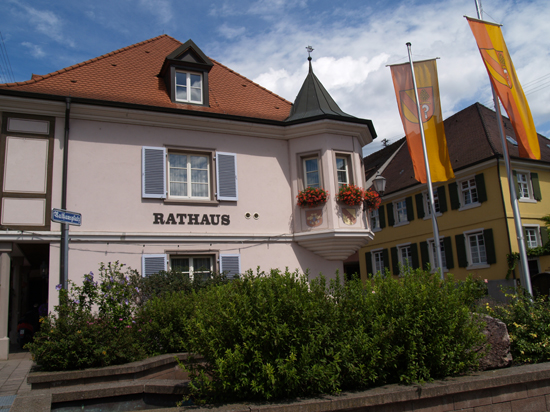 Rathaus in Ihringen Lumbaart: El municìpio de Ihringer.